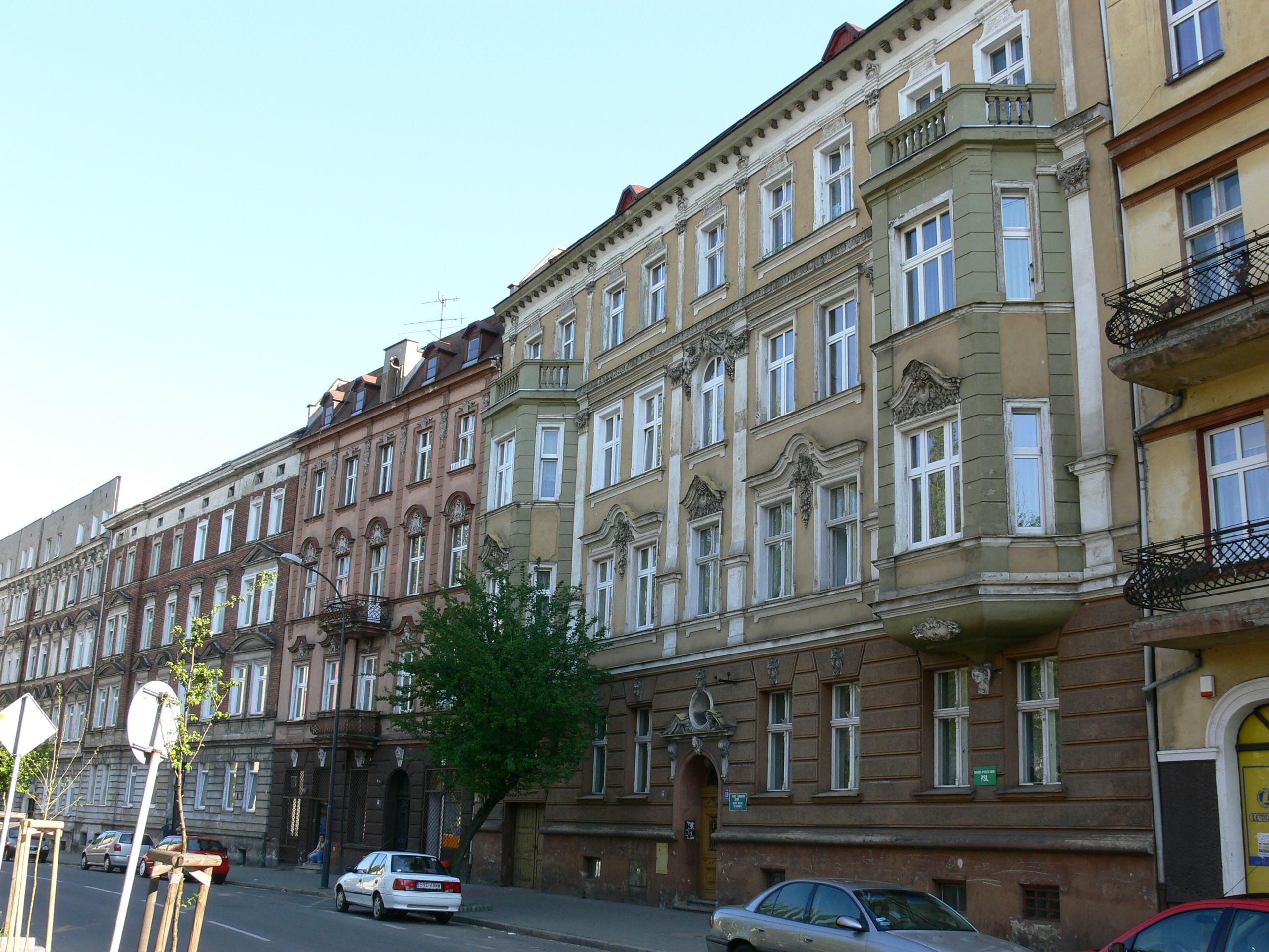 Racibórz - ul. Staszica, widok w stronę skrzyżowania z ul. Kolejową